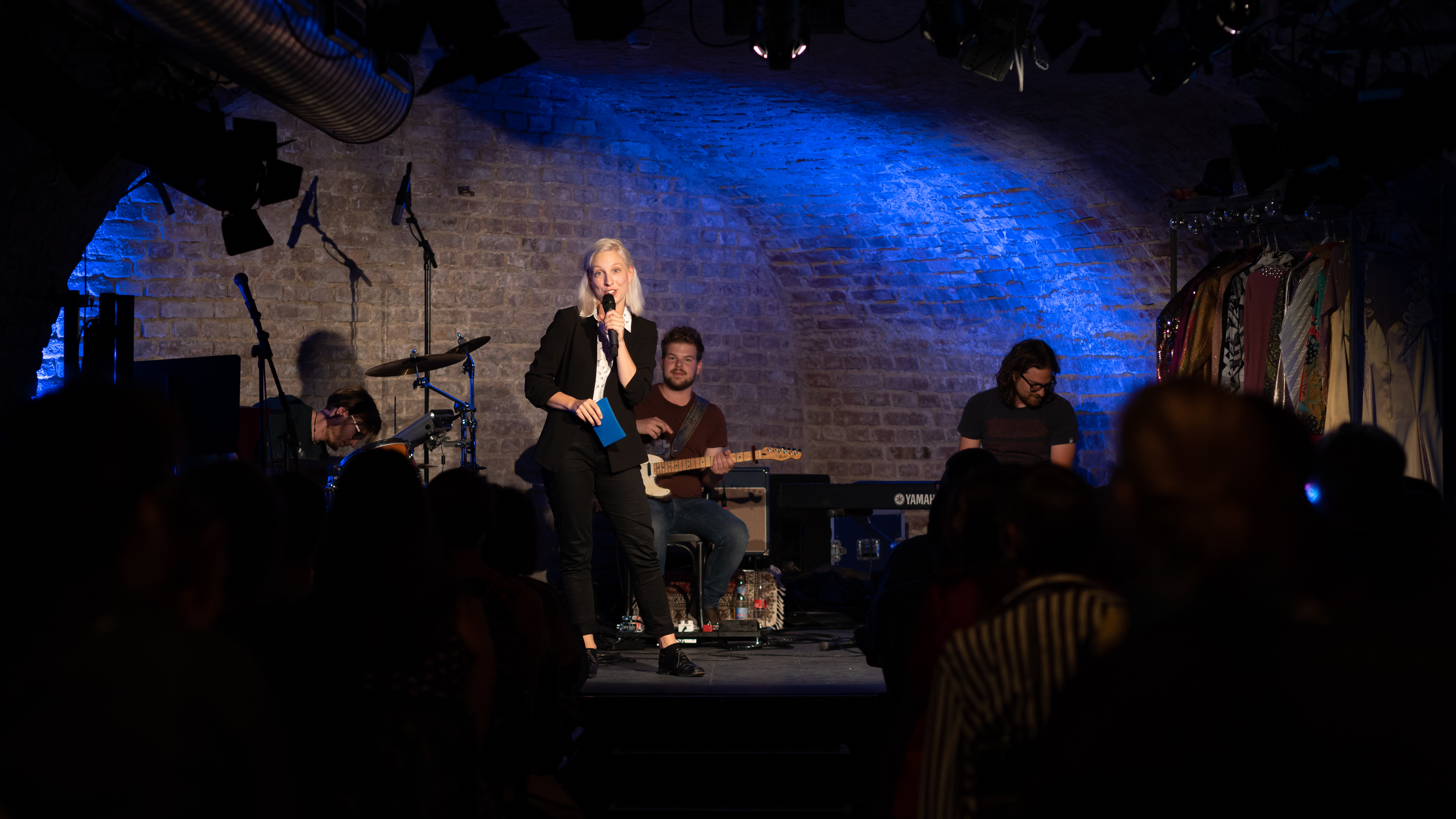 Bühne des Hoffmannkellers mit Marlene Hoffmann als Moderatorin.